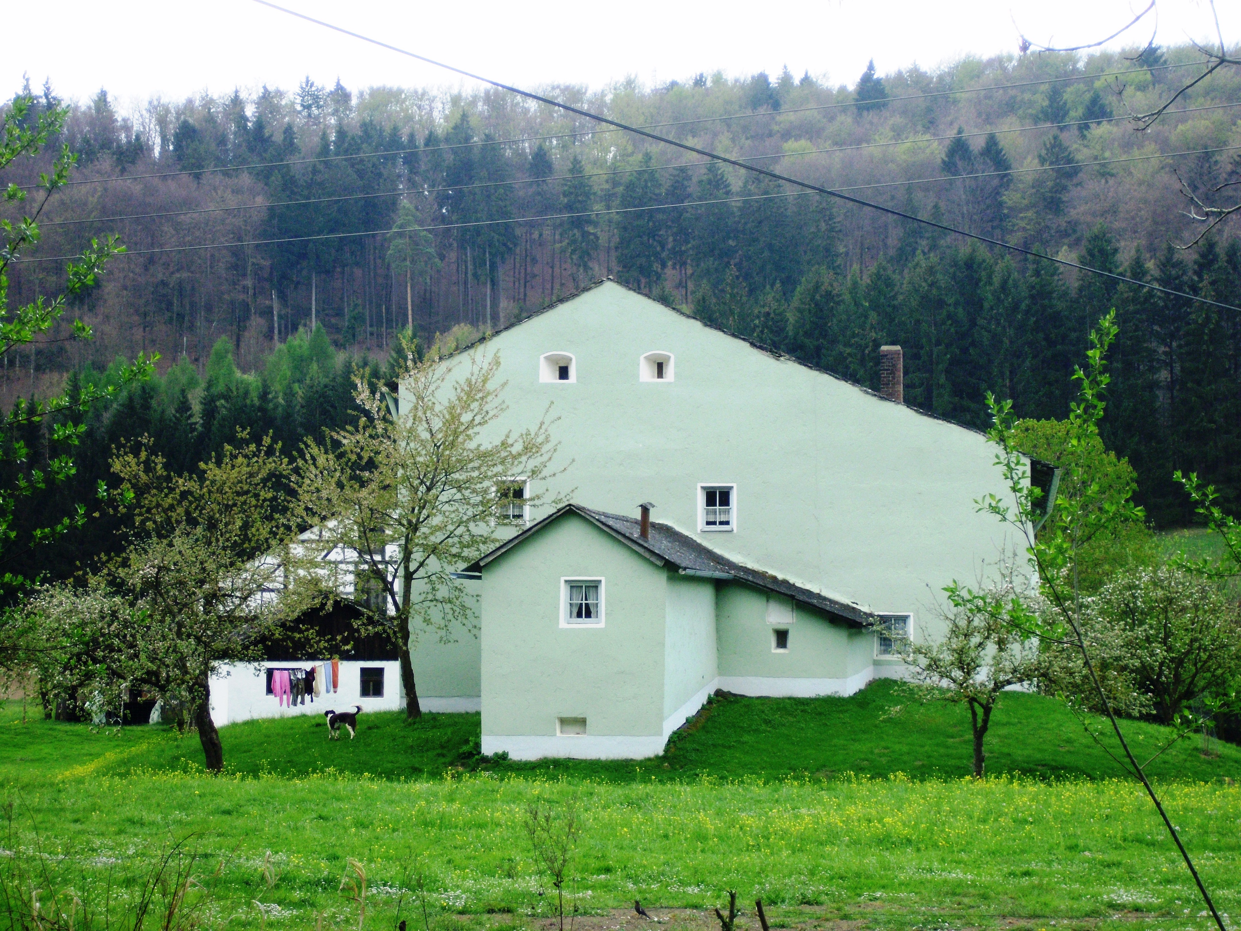 Eibwang (Ortsteil von Kinding imLandkreis Eichstätt), Festes Haus, Nordansicht